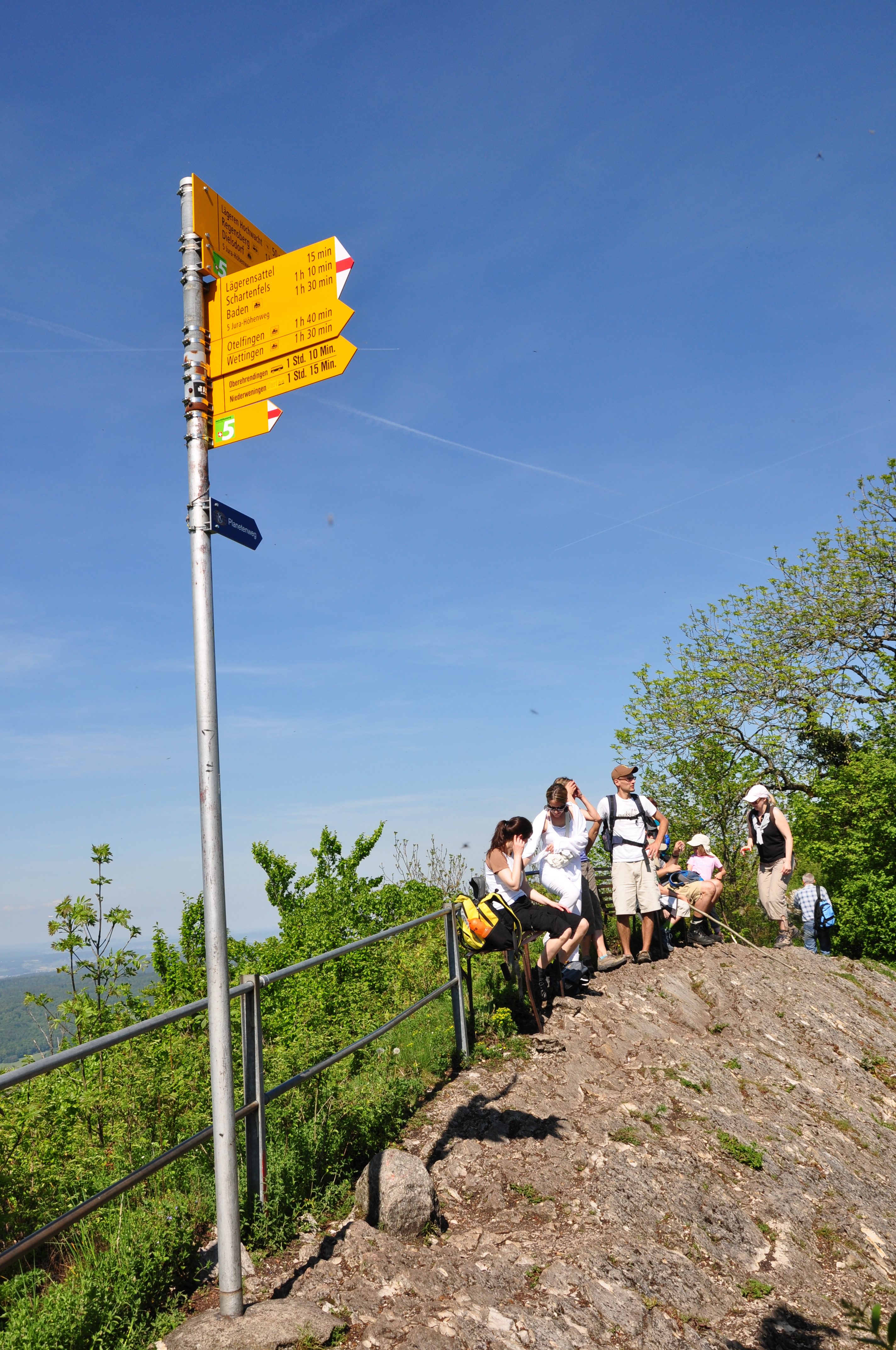 Jura-Höhenweg on Lägern (Switzerland)